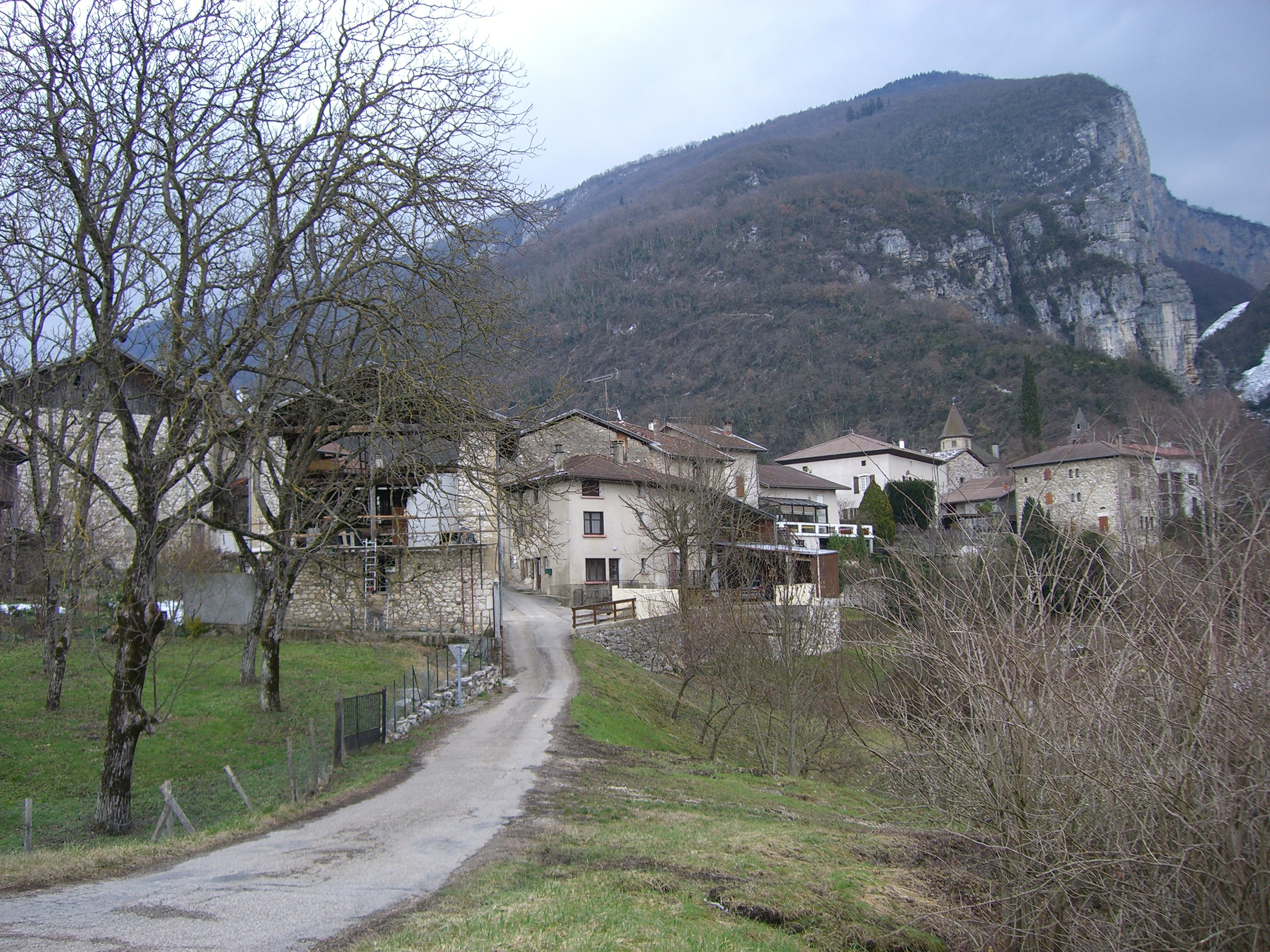 Une vue de Cognin-les-Gorges en arrivant par le sud-ouest.